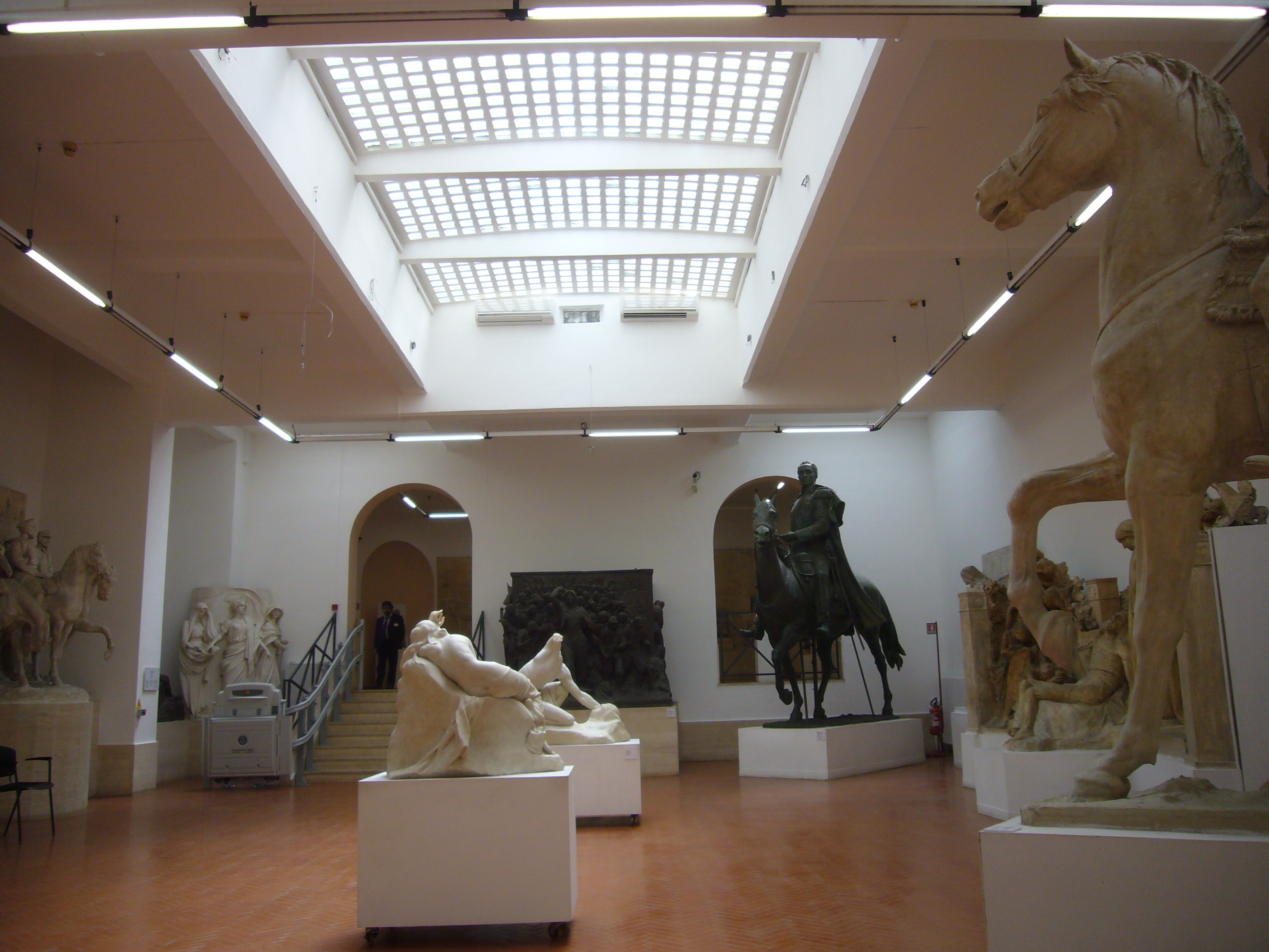 Roma, Museo Canonica a Villa Borghese. Sala 3